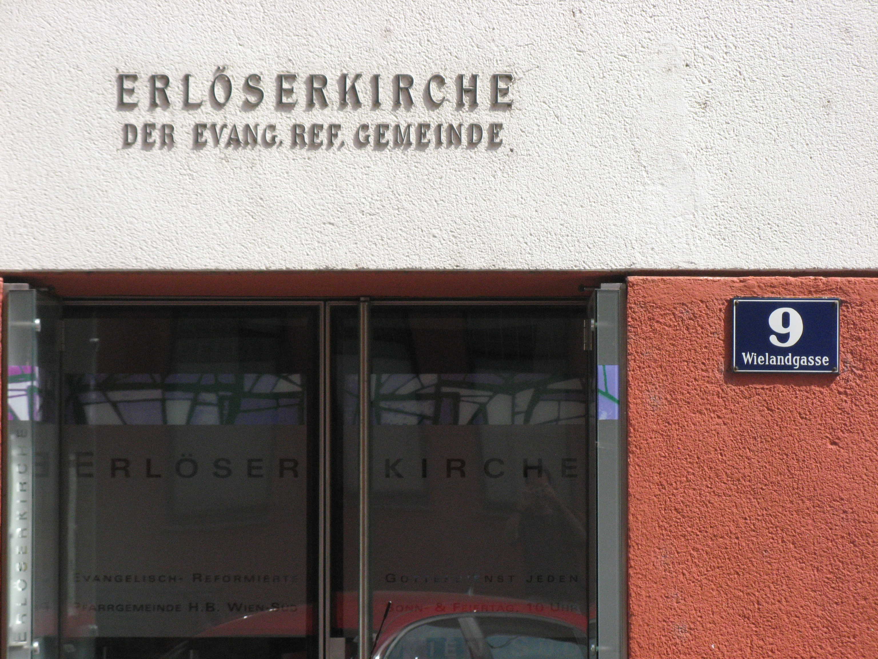 Reformierte Erlöserkirche, Wielandgasse 9, Wien-Favoriten